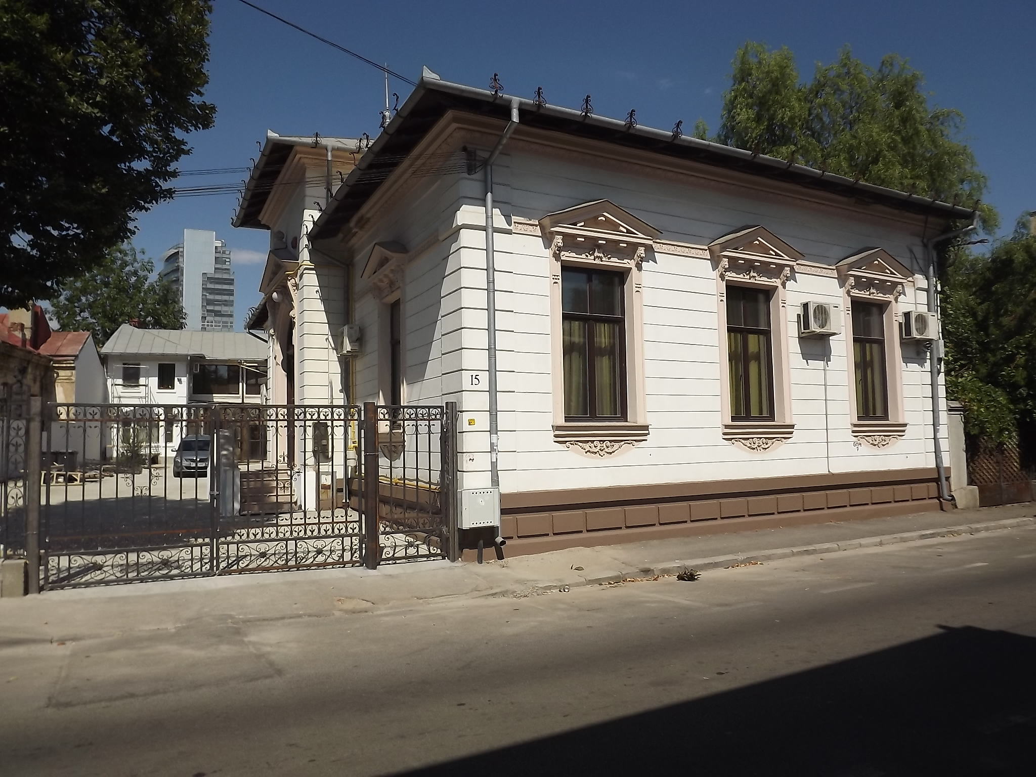 Casa Vlădescu